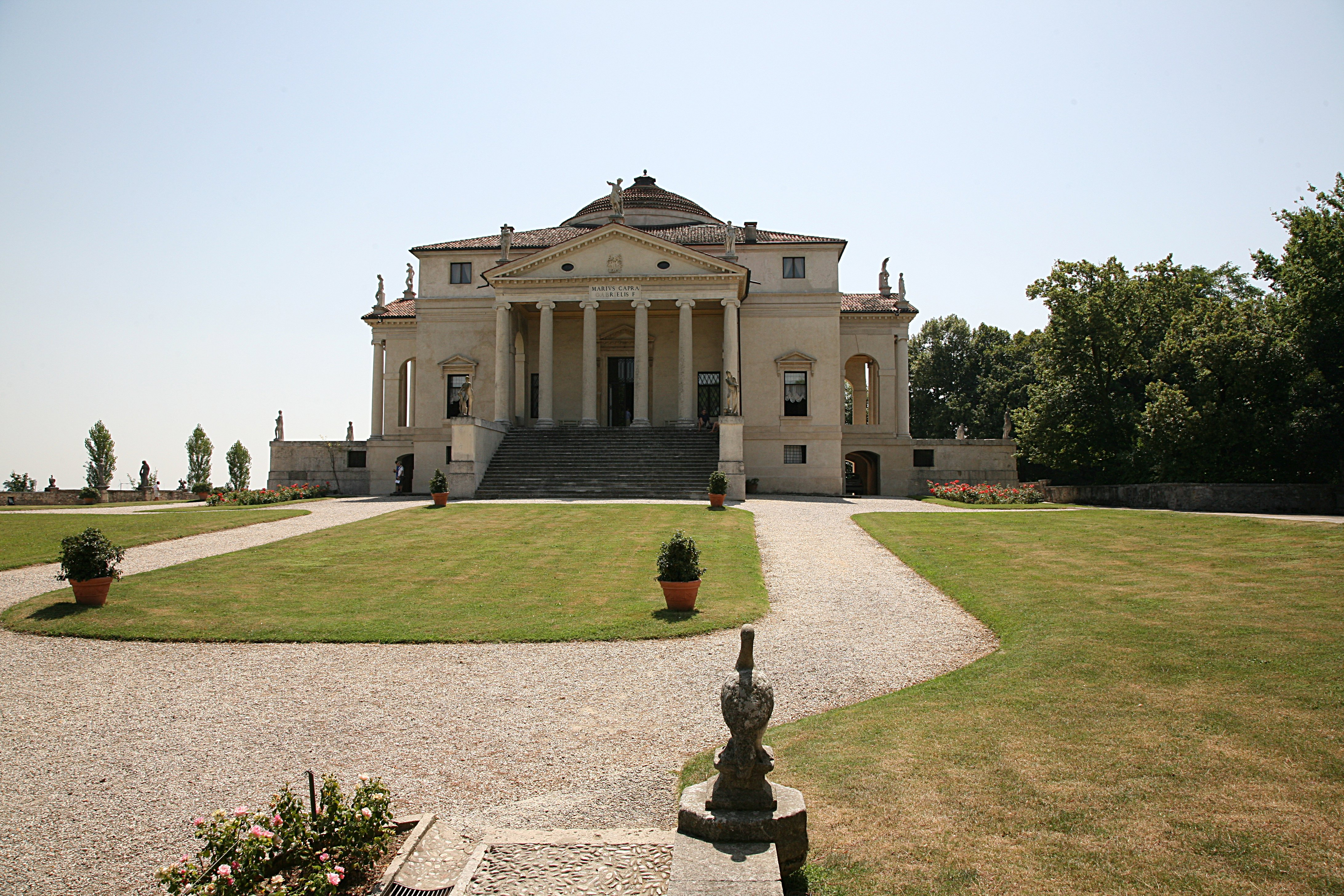 La Rotunda by Andrea Palladio